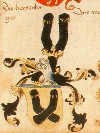 Wappen der von Hertenberg als Mitglieder der Einhorngesellschaft